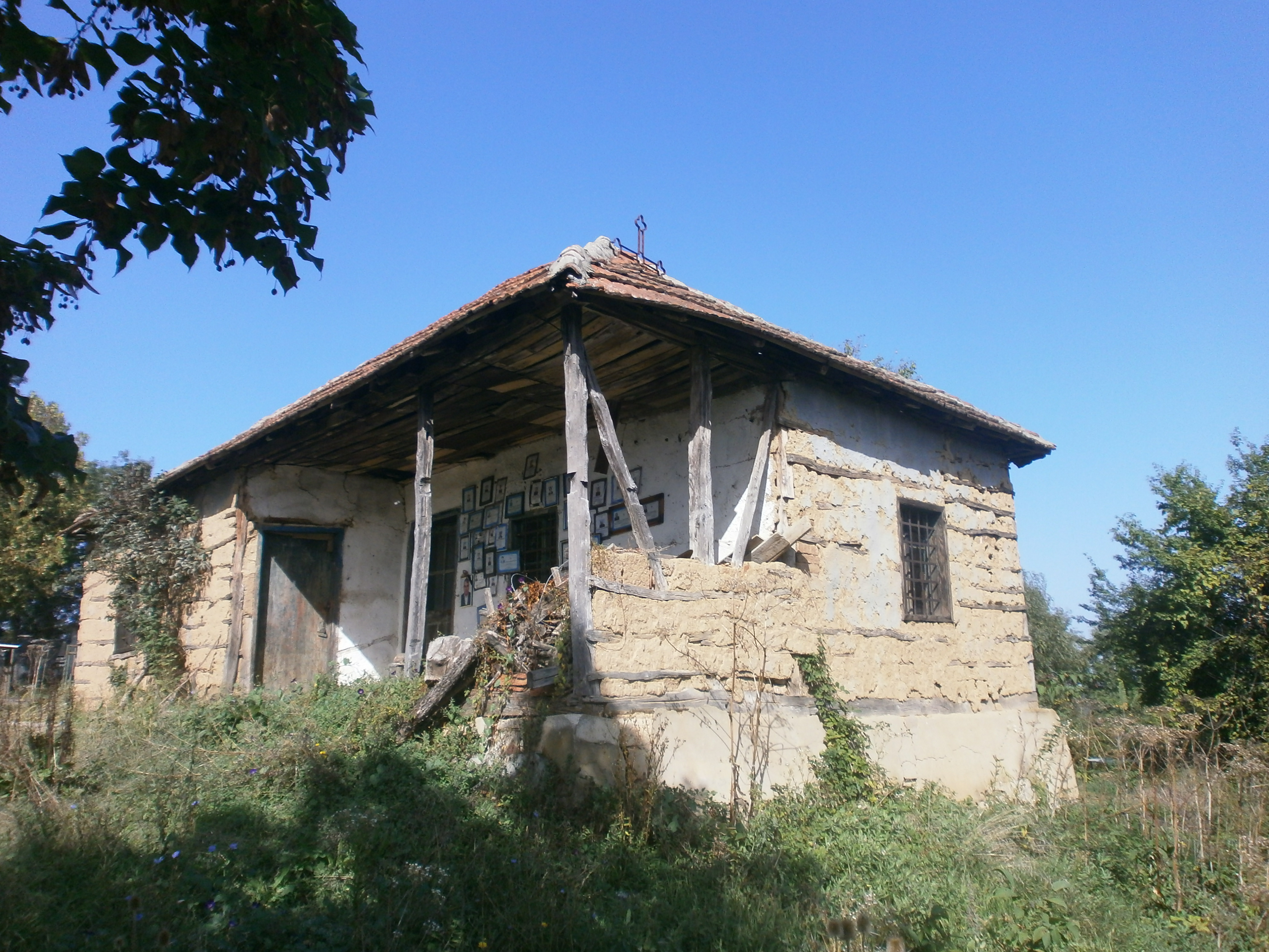 Srpski (latinica): Veliko Trnjane, Leskovac